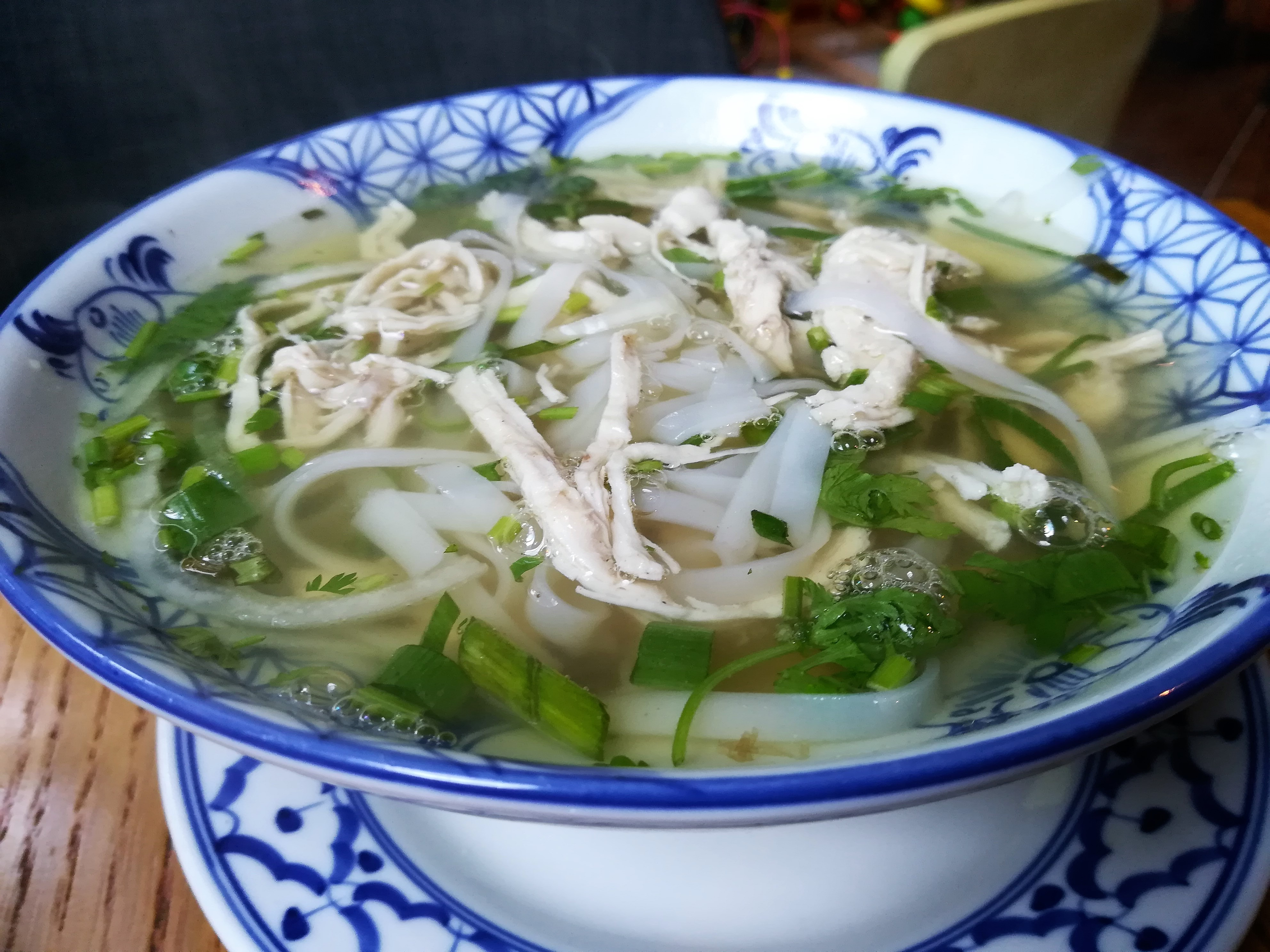 Zupa Pho w warszawskiej restauracji.